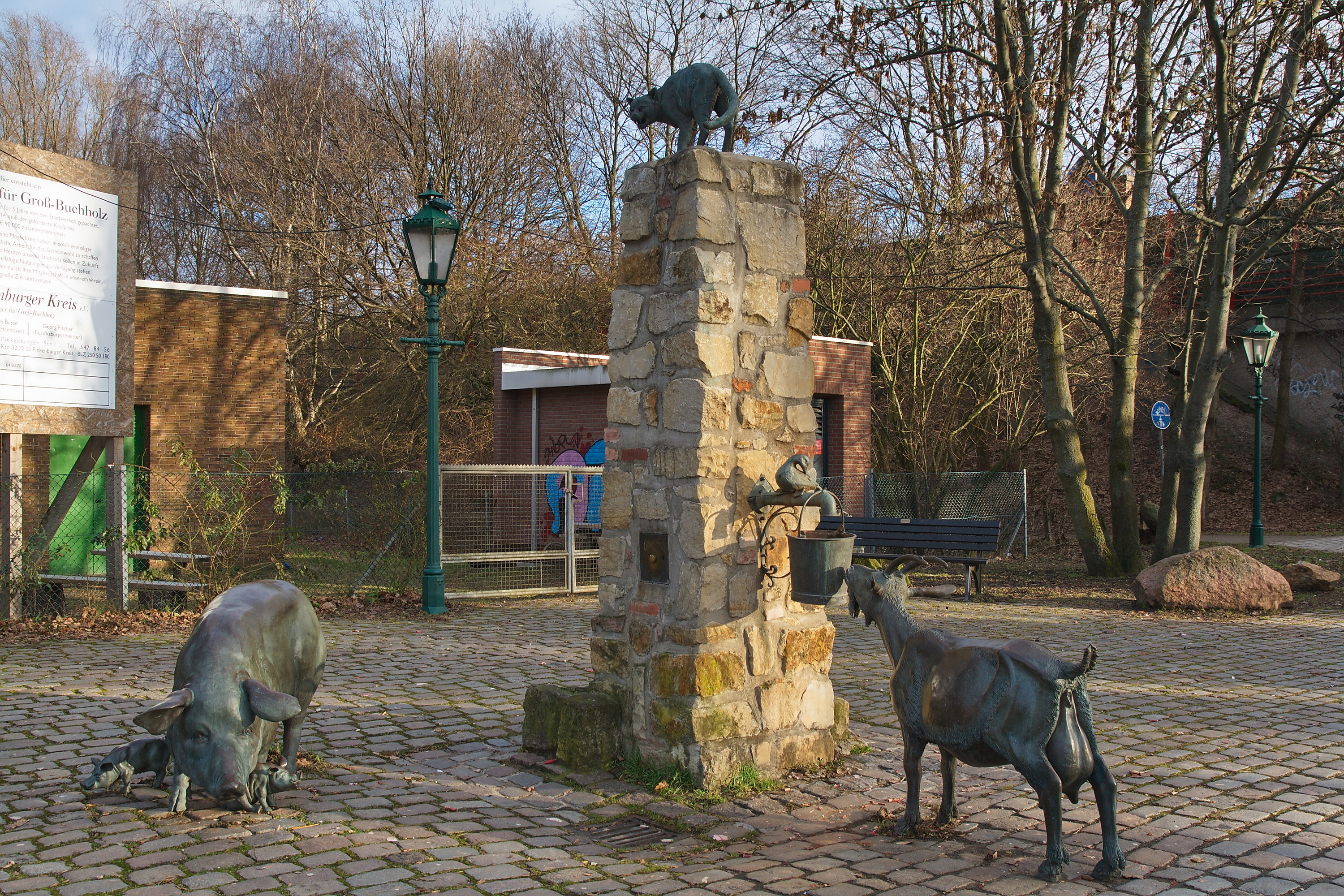 Dorfbrunnen in der Pinkenburger Straße in Großbuchholz (Hannover), Niedersachsen, Deutschland.